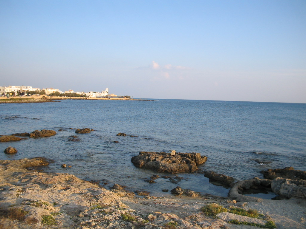 litorale roccioso di Torre San Giovanni (Ugento) - provincia di Lecce